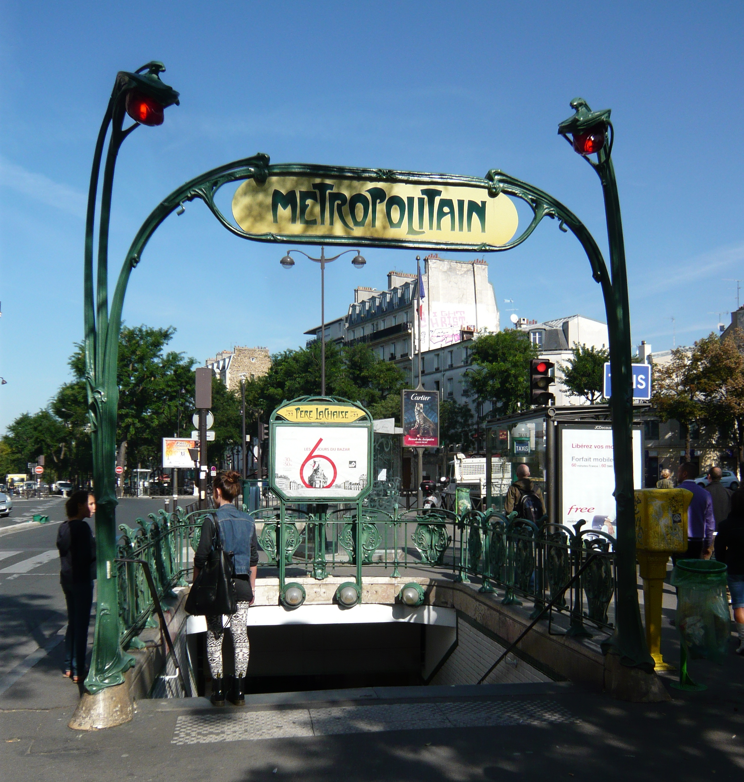 Edicule Guimard Métro Père-Lachaise